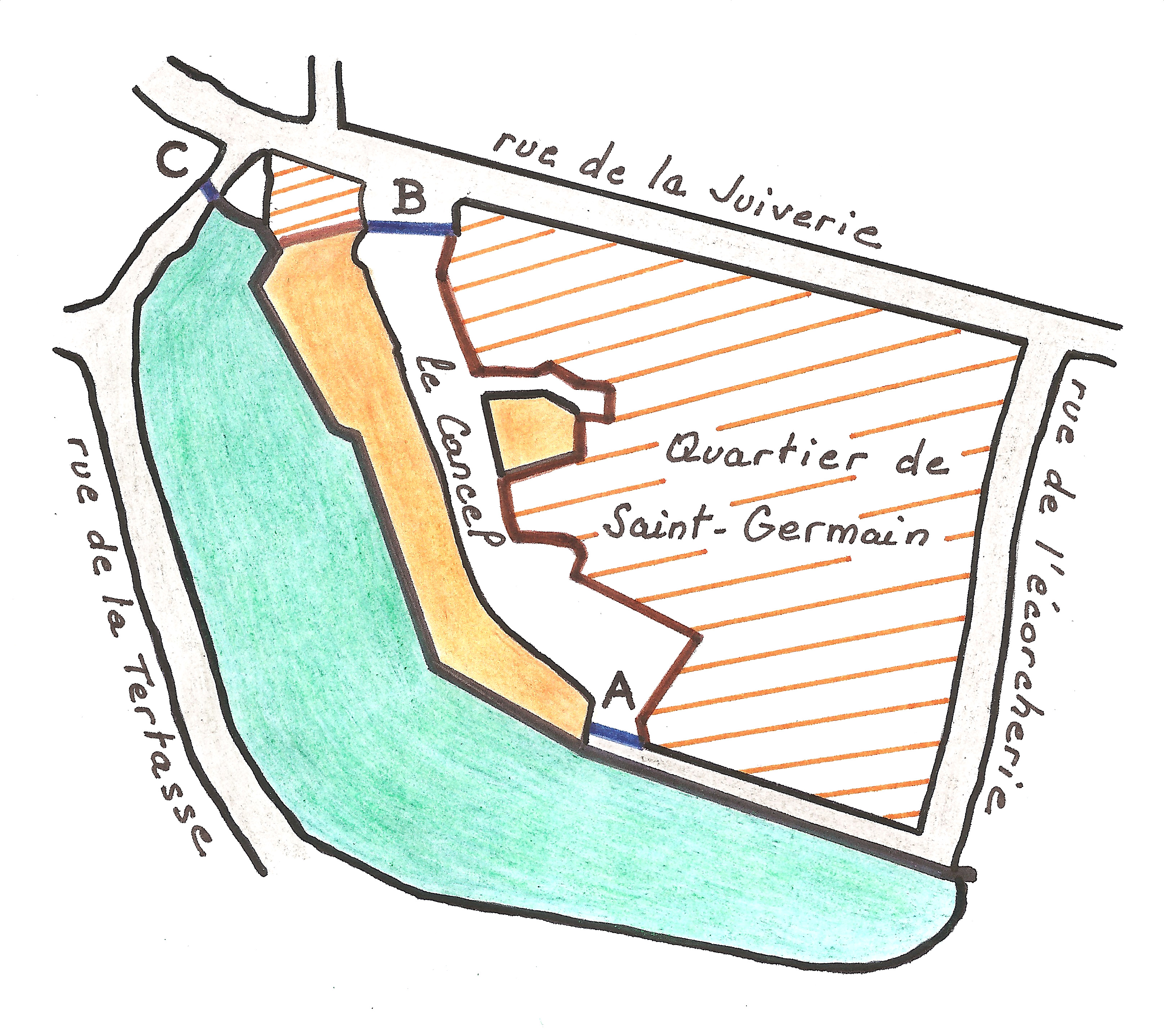 Plan du Cancel juif de Genève (1428-1490), réalisé par Jean Plançon d'après les notes et relevés topographiques de l'archéologue cantonal genevois Louis Blondel réalisés en décembre 1915.